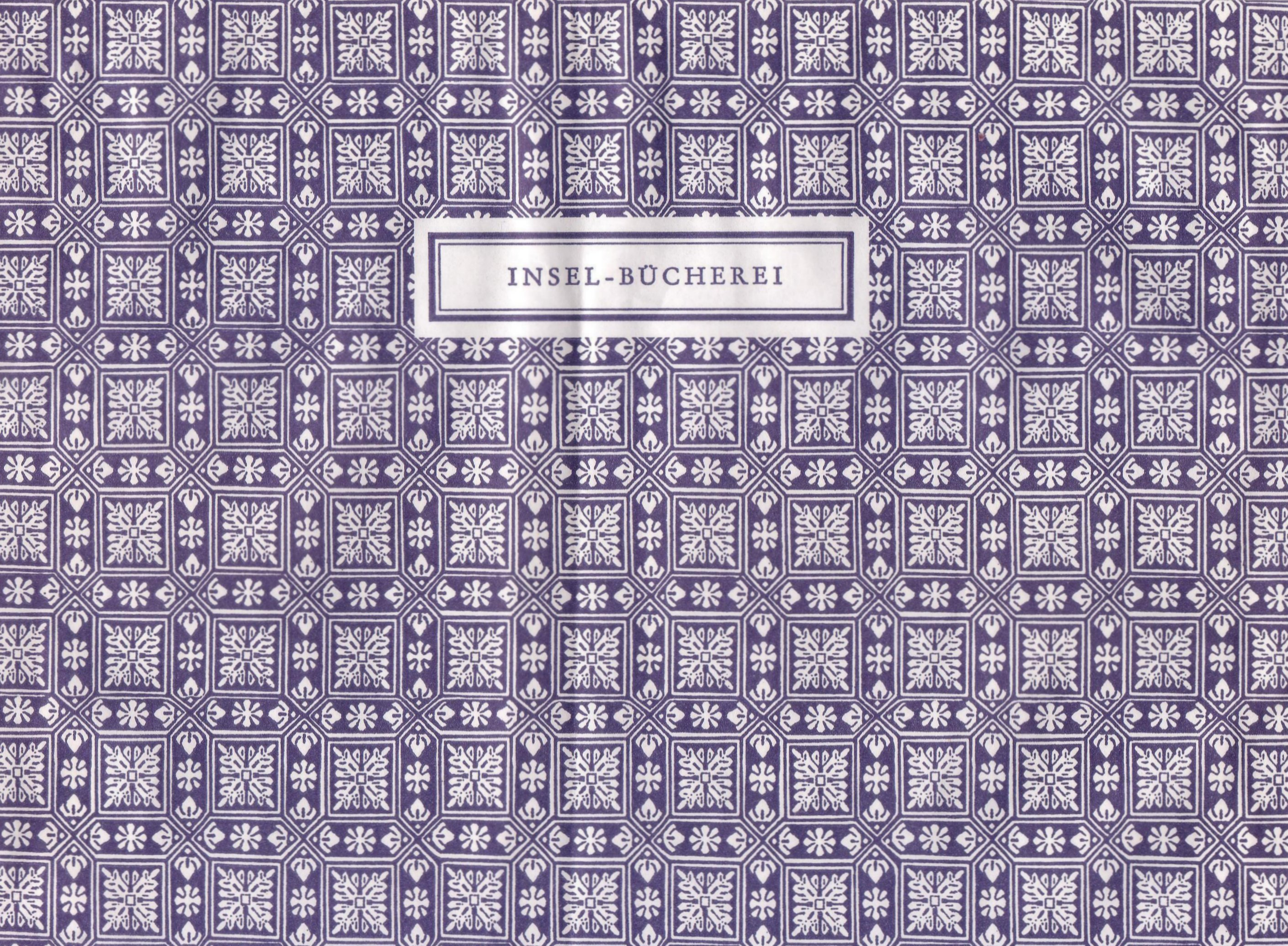 Verkaufsumschlag für IB 1-A und IB 1000 1978, Bildmotiv: Goethes Schlafzimmer vor 1832